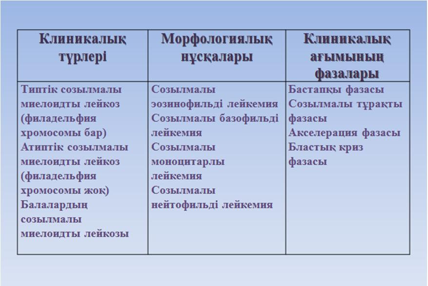 Созылмалы миелоидты лейкоздың жіктемесі (Athens, 1993)